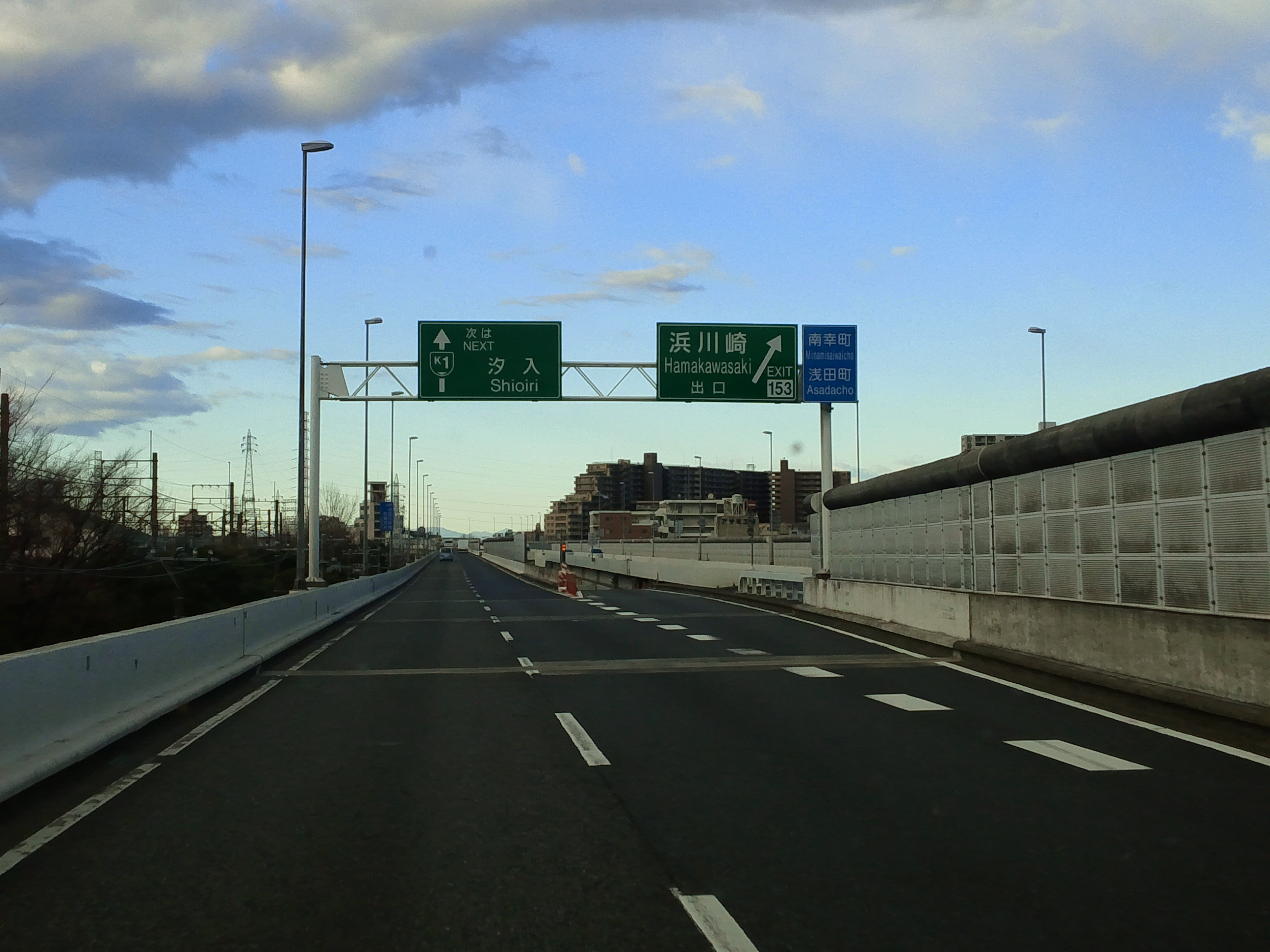 首都高速道路神奈川1号横羽線浜川崎出口付近（金港JCT方面側出口）